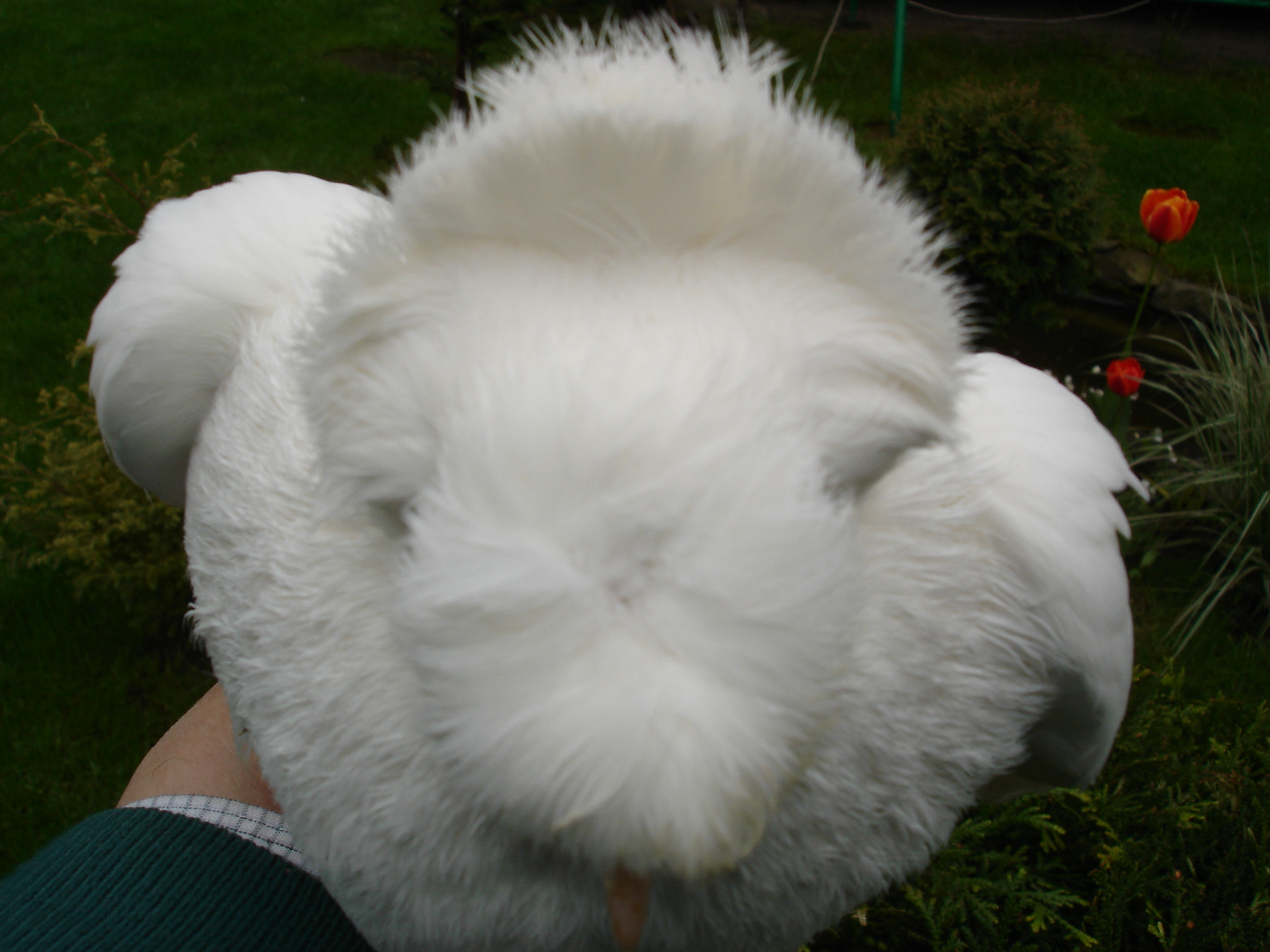 Zdjęcie głowy frankońskiego turkota